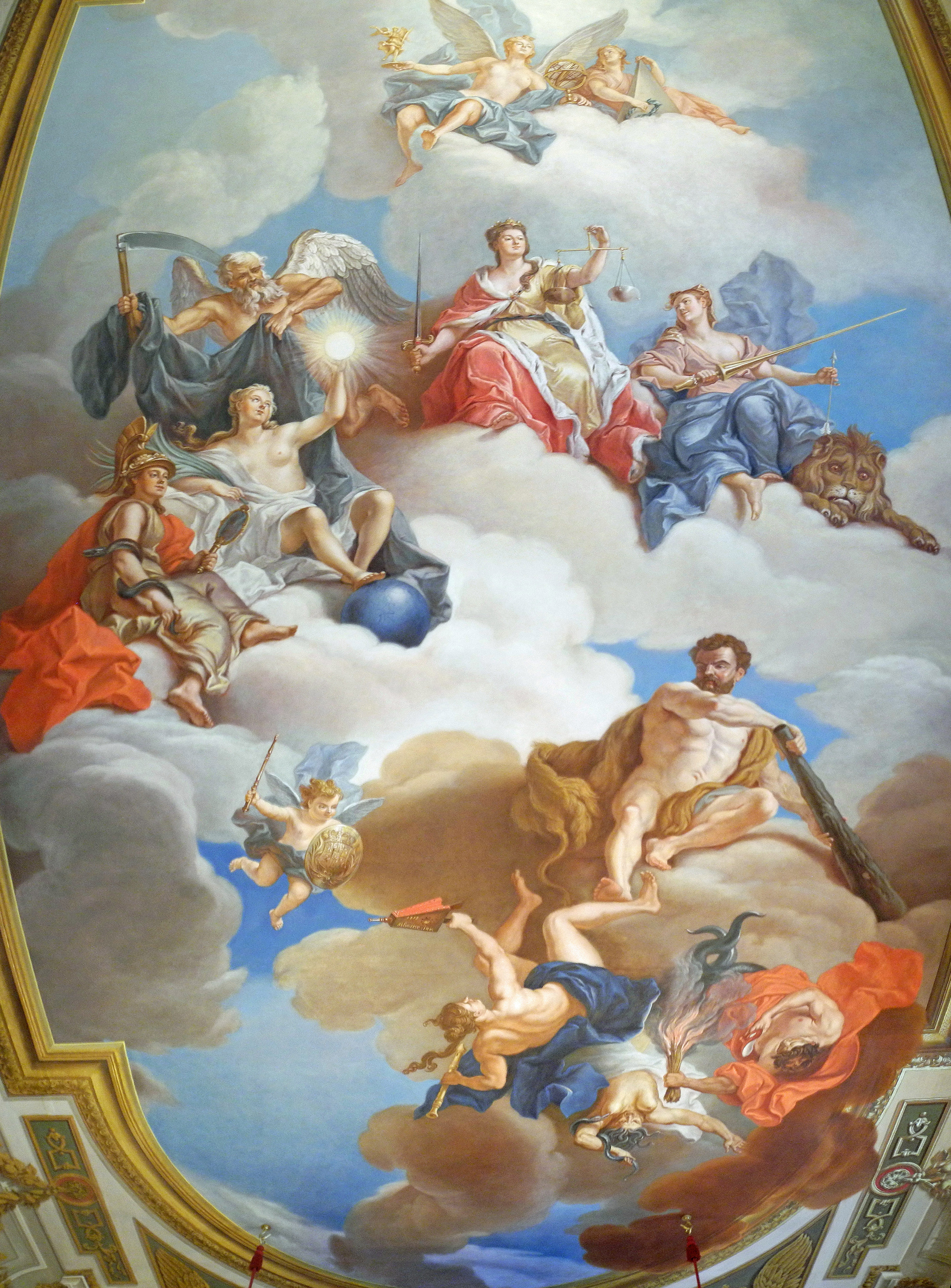 Die Königlichen Paraderäume im Residenzschloss Dresden am Eröffnungstag 28. September 2019 – Deckengemälde „Allegorie auf die weise Regierung des Hauses Wettin“ im Audienzgemach (urspr. von Louis de Silvestre, 1719)